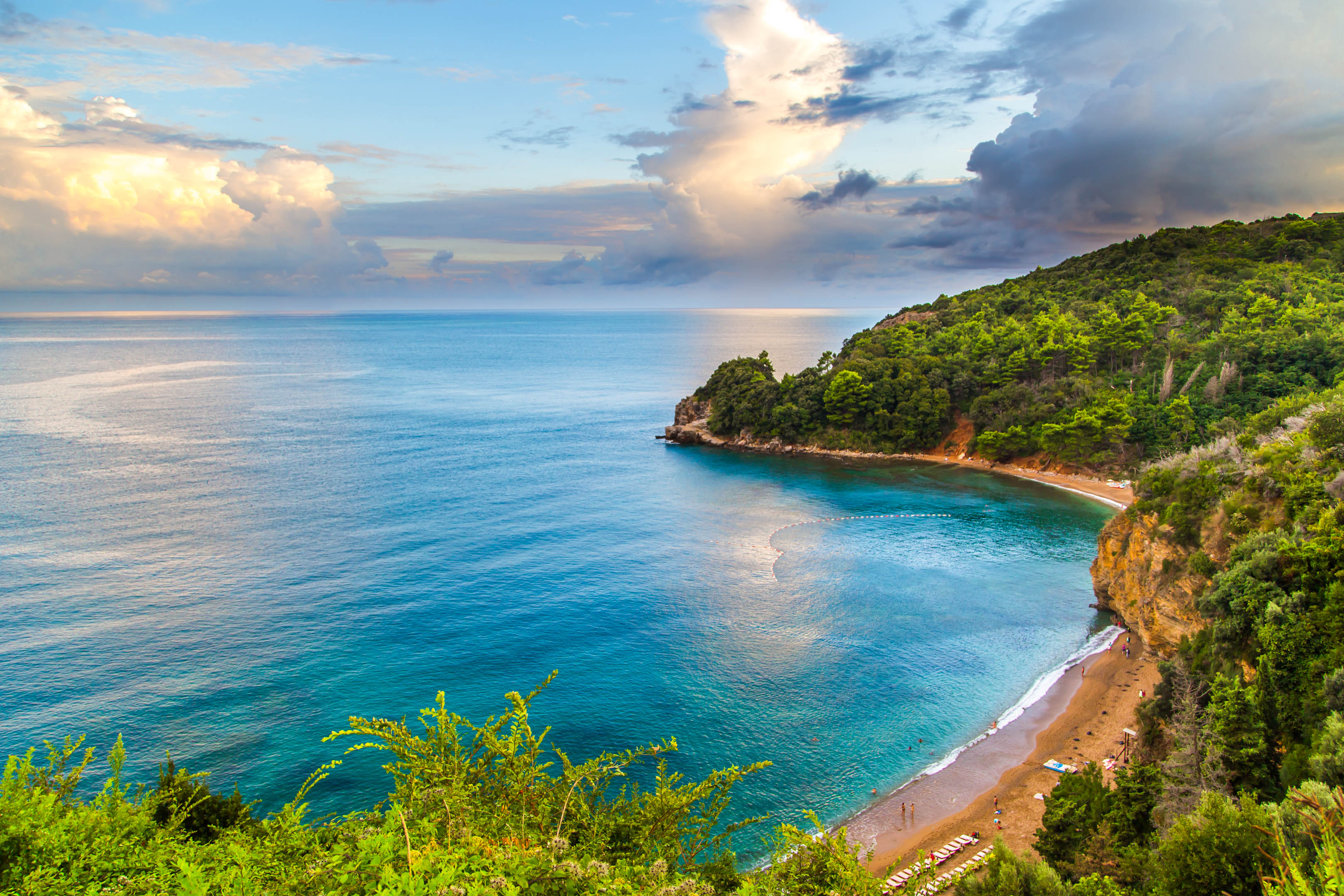 Budva, Montenegro